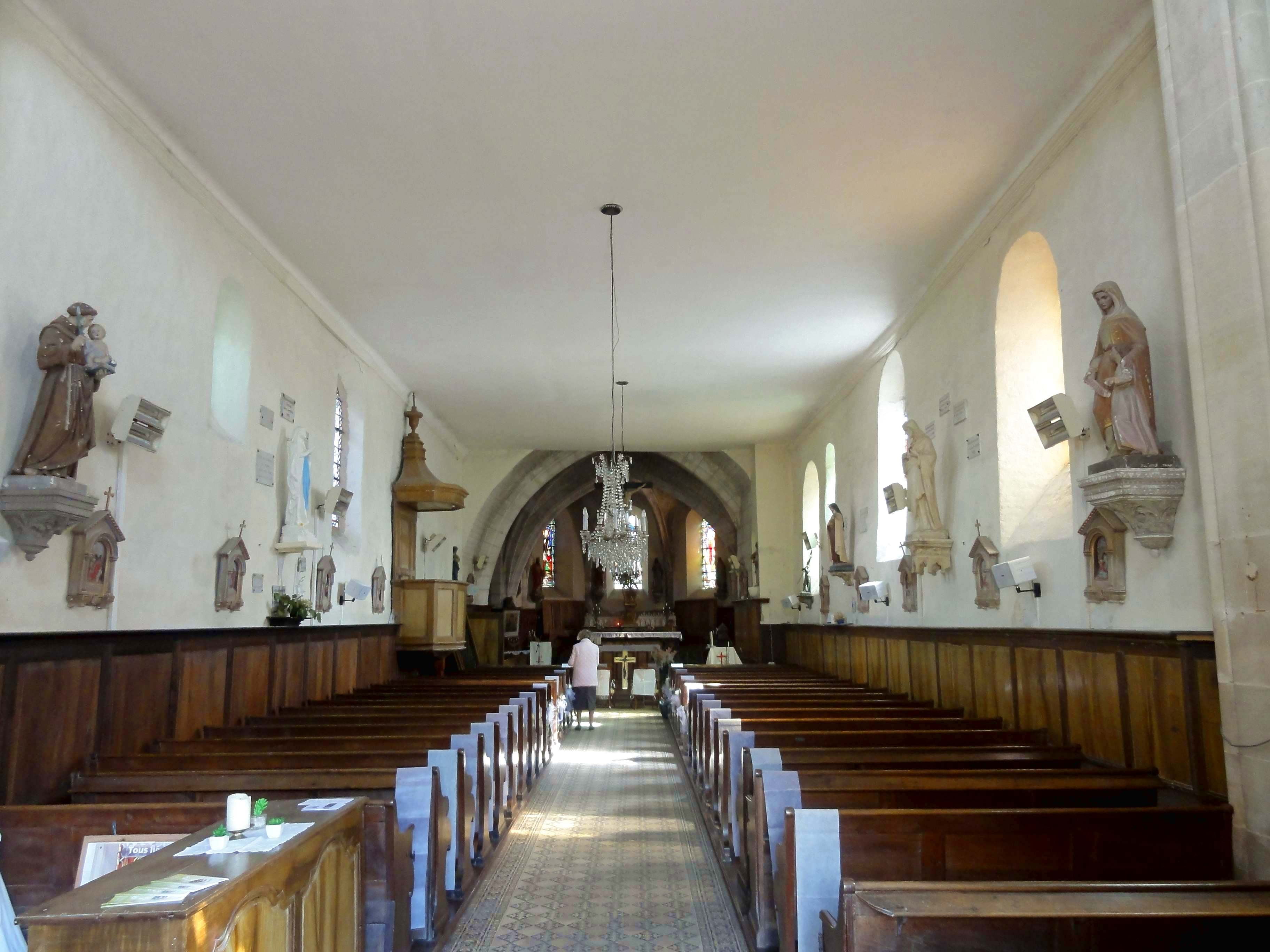 Intérieur de l'église - voir titre.